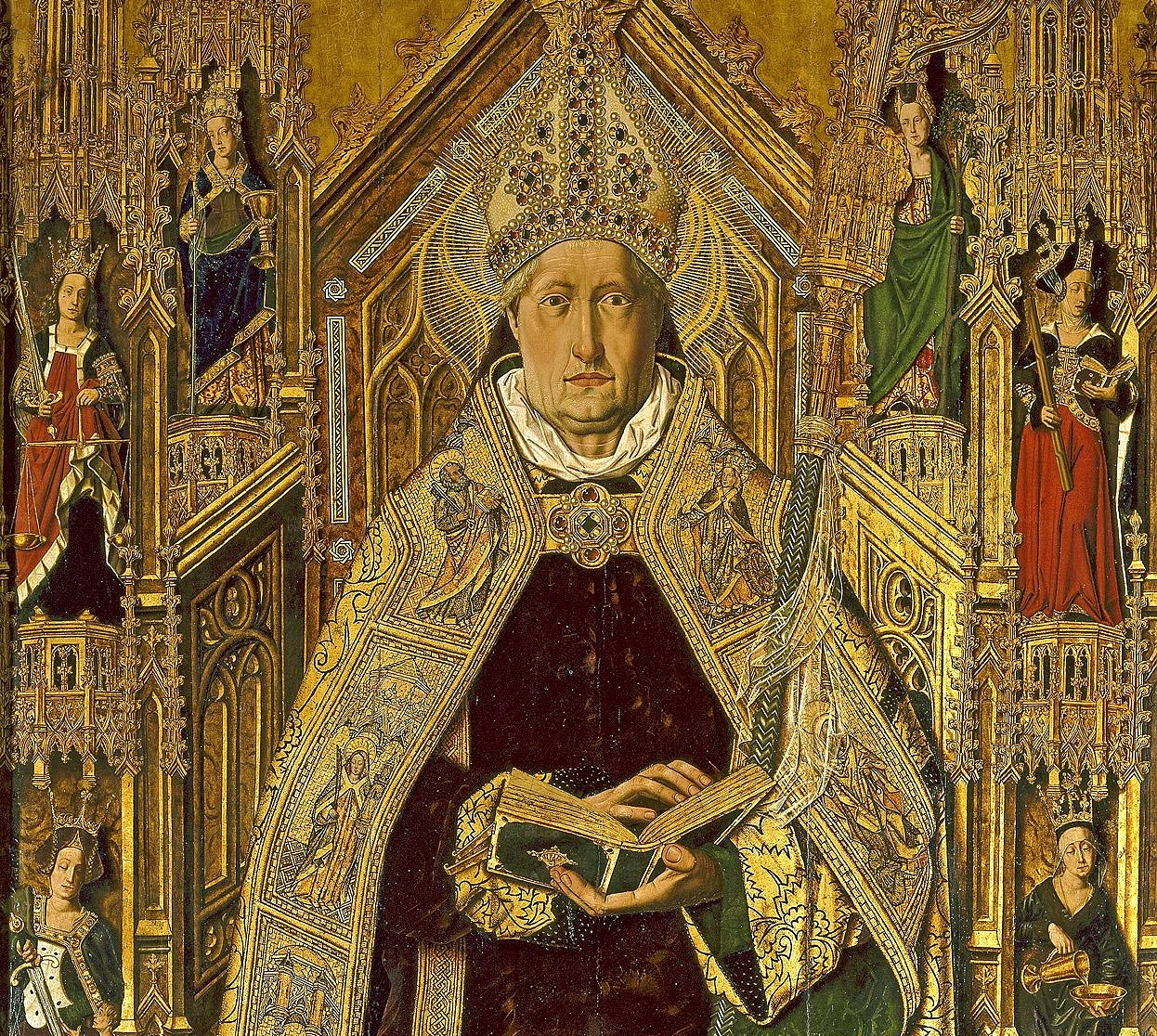 Detalle de Santo Domingo de Silos (Bartolomé Bermejo)